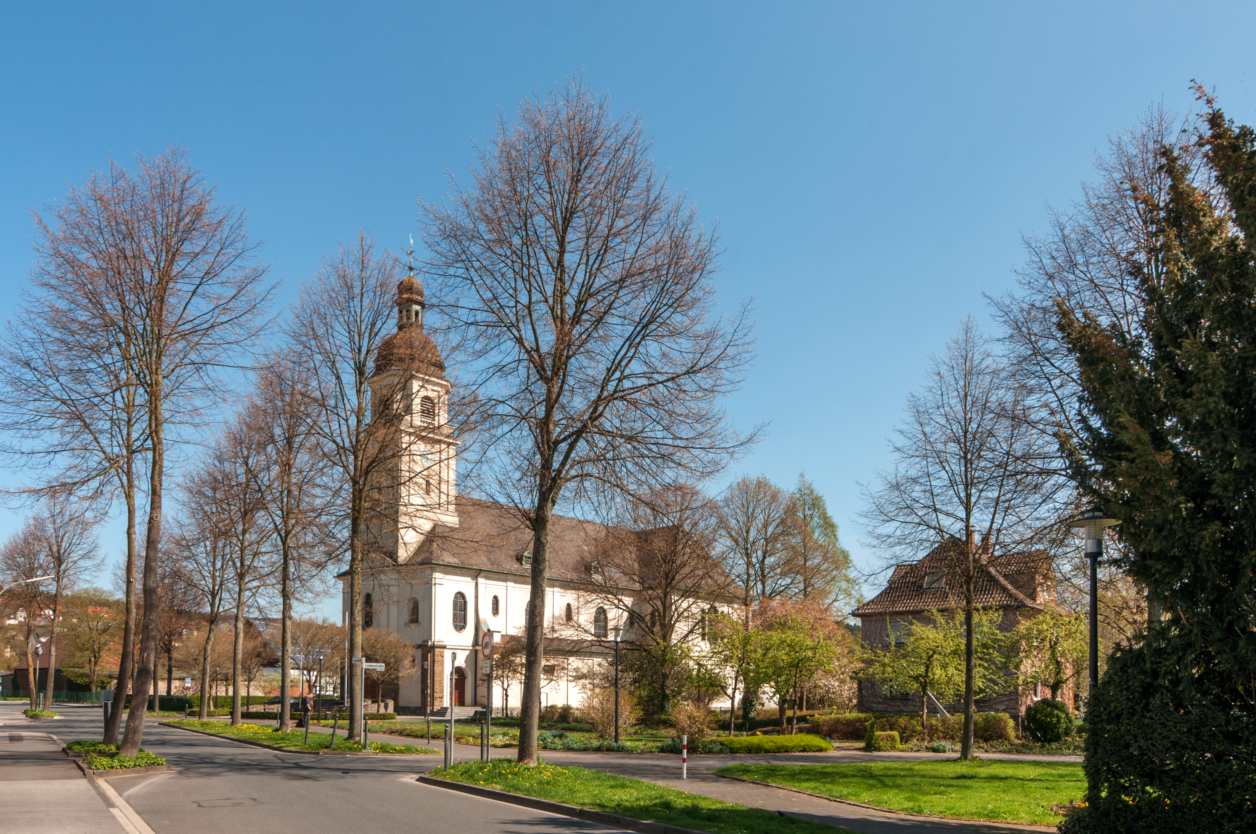 Bruchhausen (AR) - Ss. Maria-Magdalena und Lucia